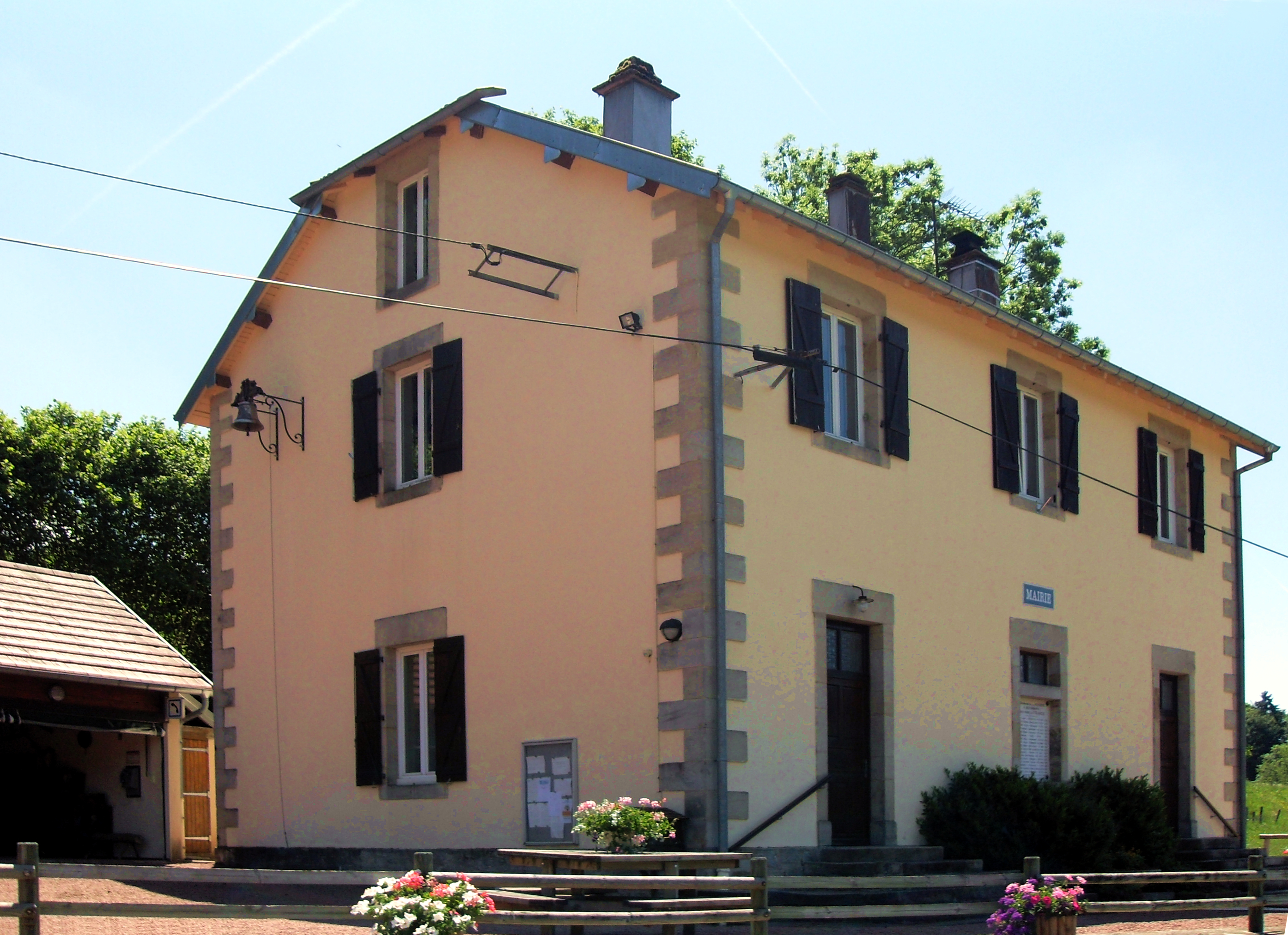 La mairie de la Rosière